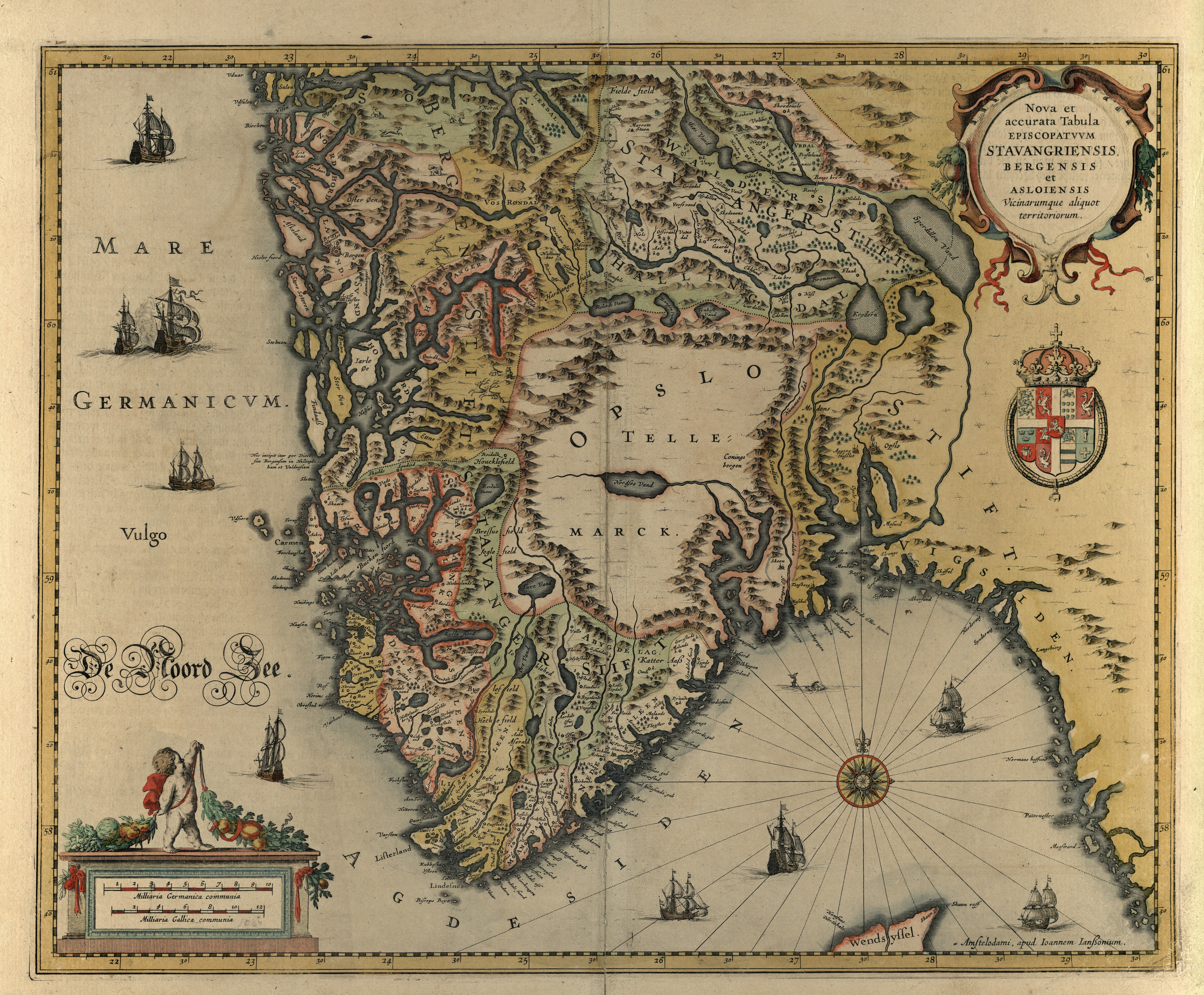 Kart fra Nasjonalbibliotekets kartsamling. Kartet er gitt ut i (1644) og viser Sør-Norge.